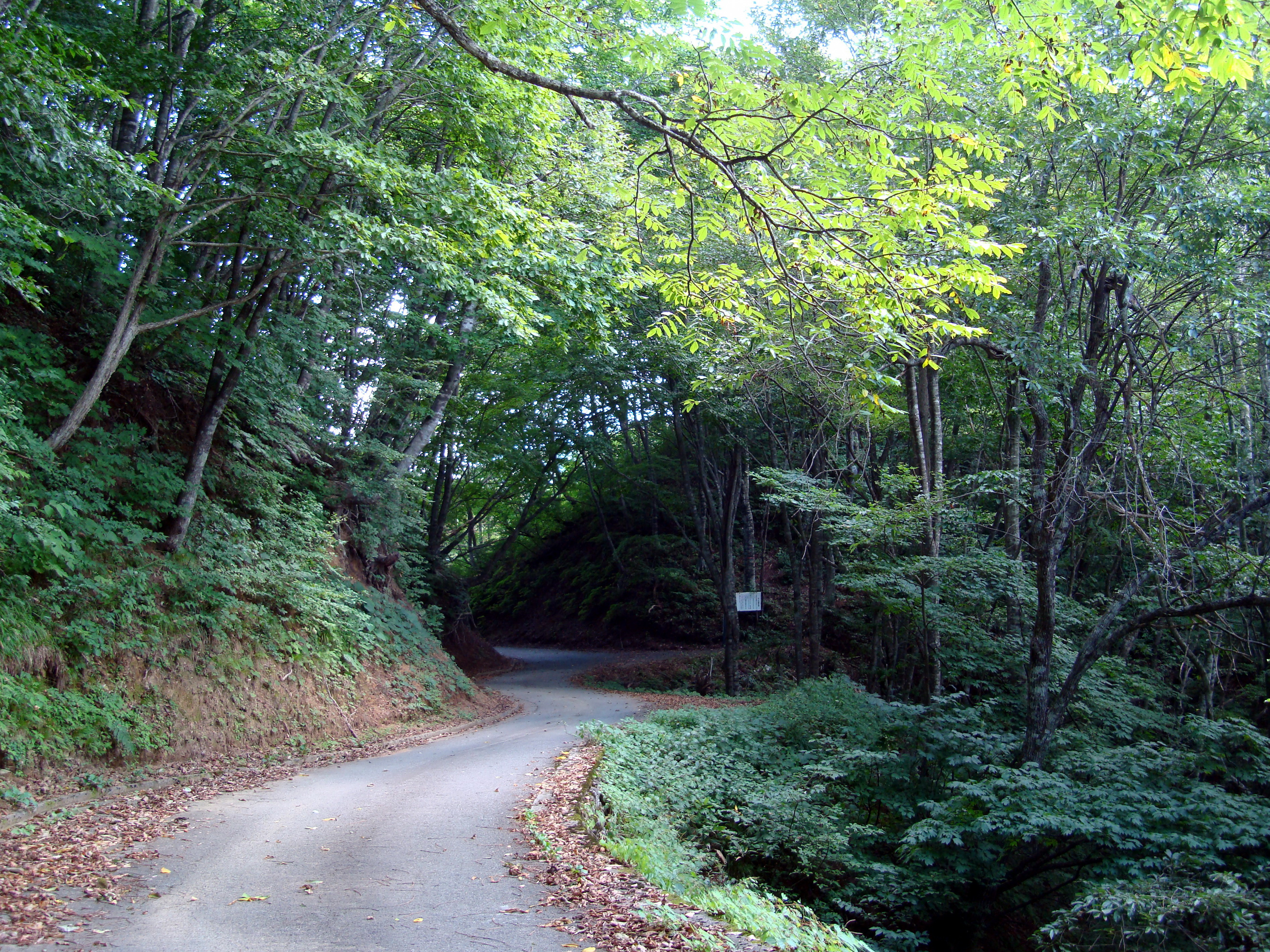 伊勢峠＠福井県